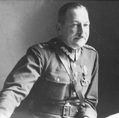 Pułkownik Ludwik Bittner